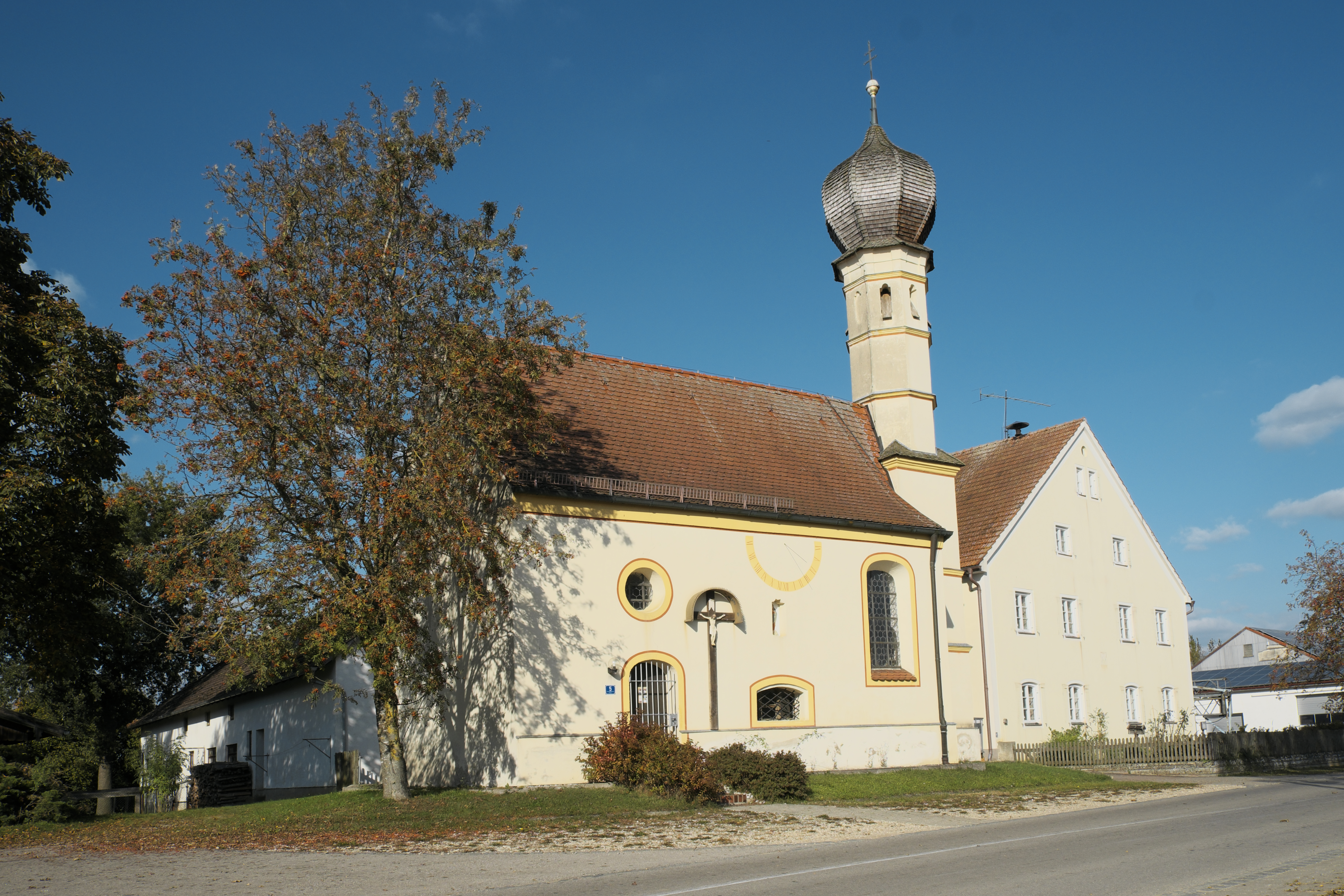 Katholische Filialkirche Unsere Liebe Frau in Machtenstein (Schwabhausen) im Landkreis Dachau (Bayern/Deutschland)